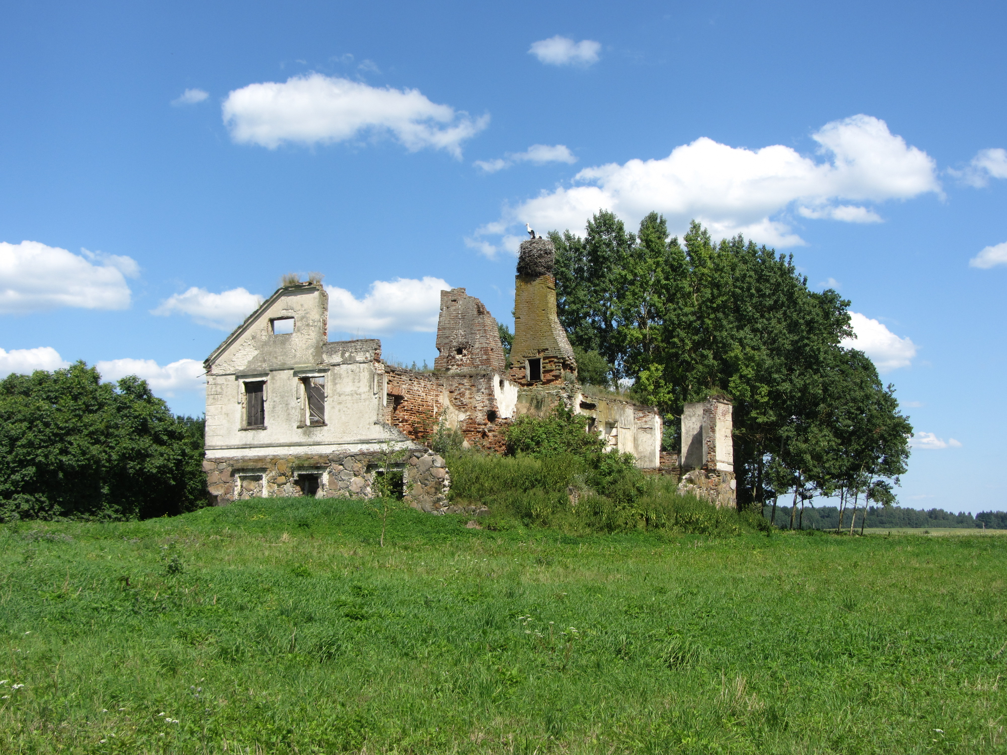 Gelvonų sen., Lithuania